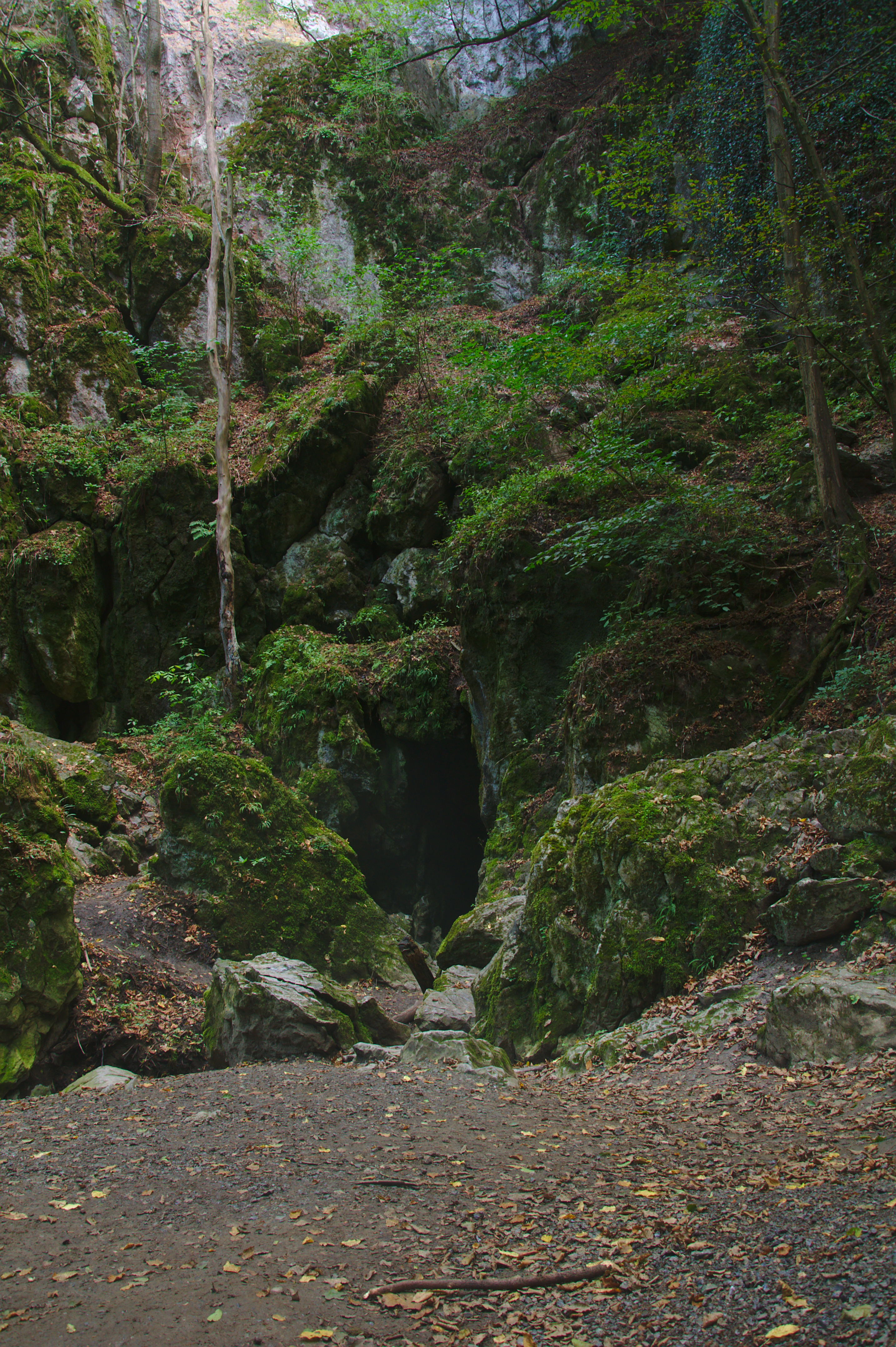 Propadání Jedovnického potoka, národní přírodní rezervace Rudické propadání, okres Blansko